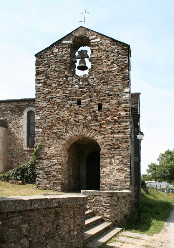 Arfons (Tarn) - eglise